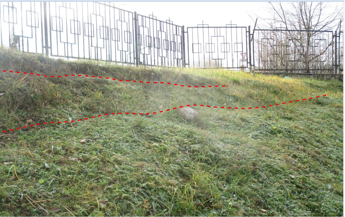 Техногенный оползень в четвертичных суглинках